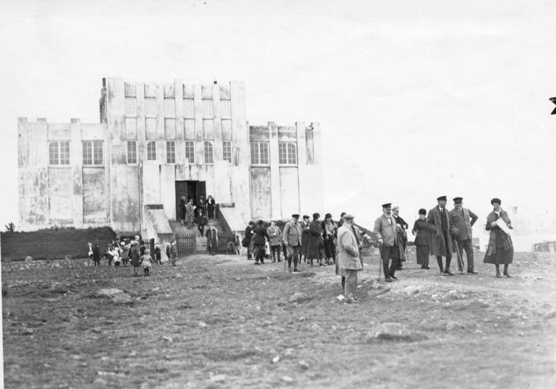 Polarfahrt mit dem Dampfer "München".- Passagiere vor dem Museum Einar Jonssons 17. Juli - 12. August 1925